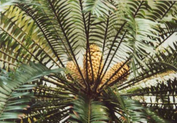 Fiore di Cycas, pianta conservata in serra nel Giardino dei Semplici di Firenze